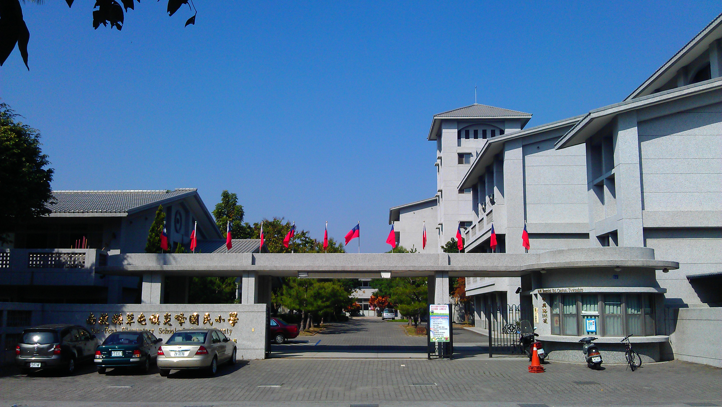 中文（台灣）: 南投縣草屯鎮炎峰國民小學